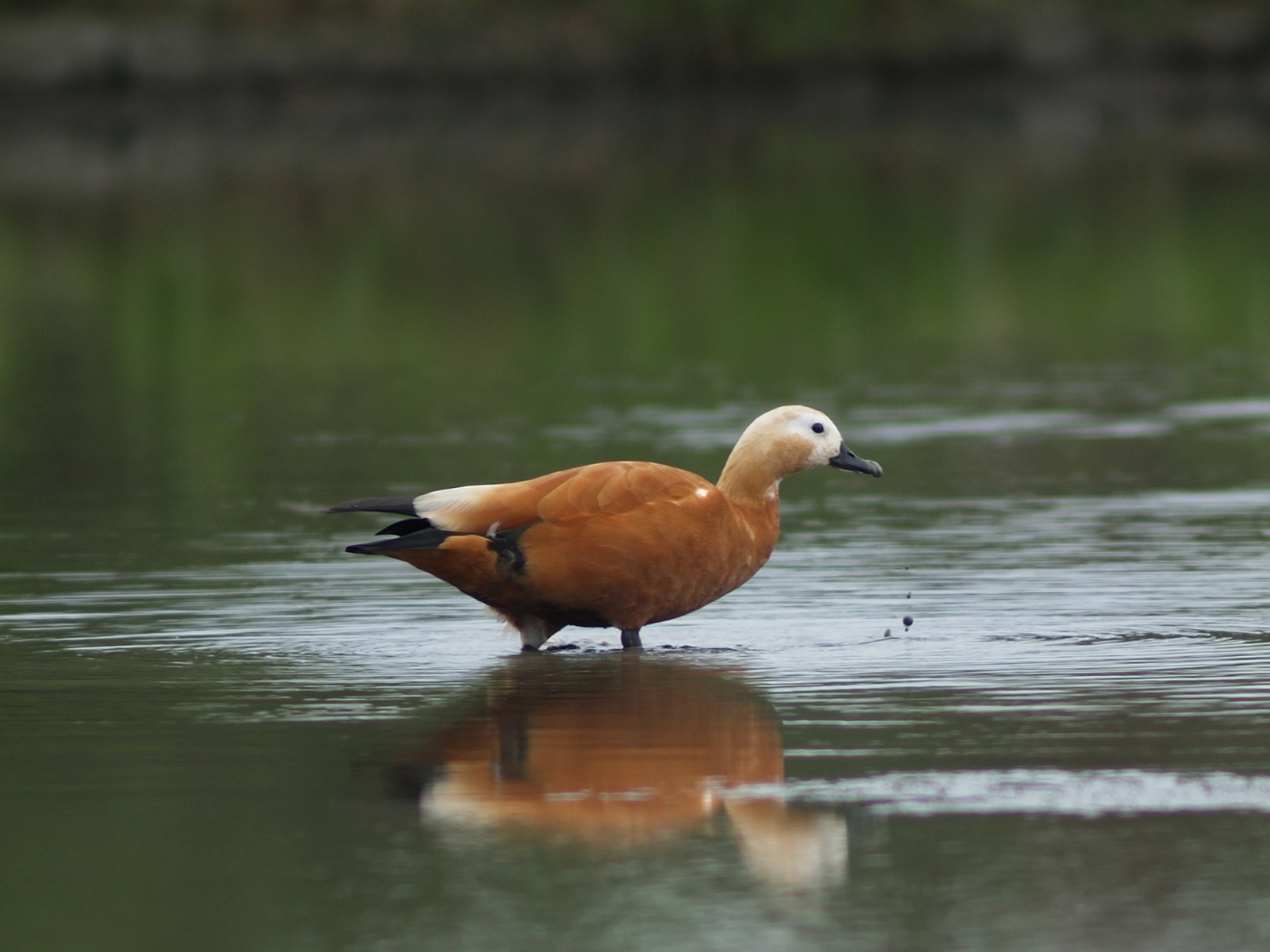 Tadorna ferruginea 赤麻鴨、瀆鳬